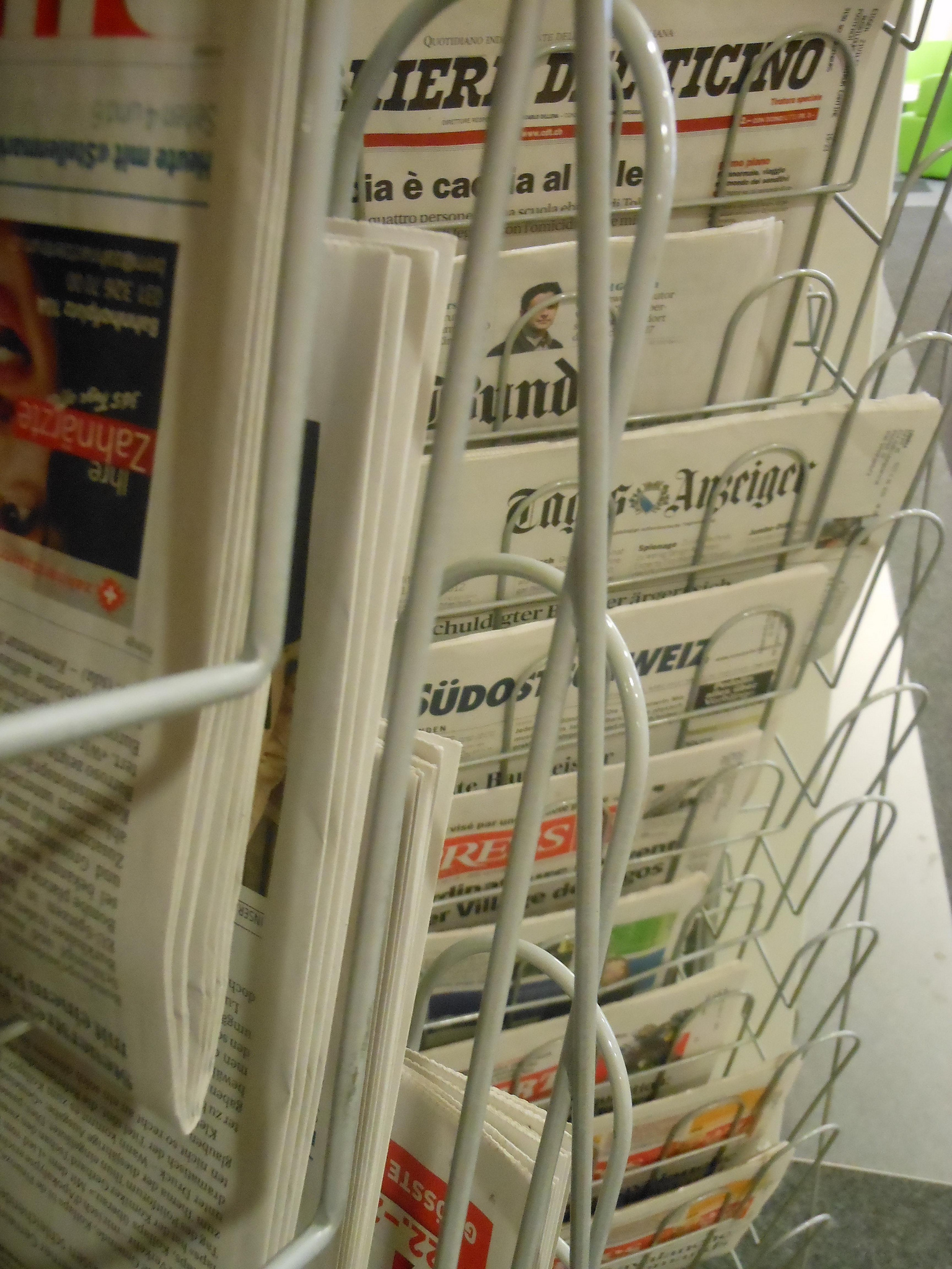 Zeitungen Newspaper Ständer Schweiz